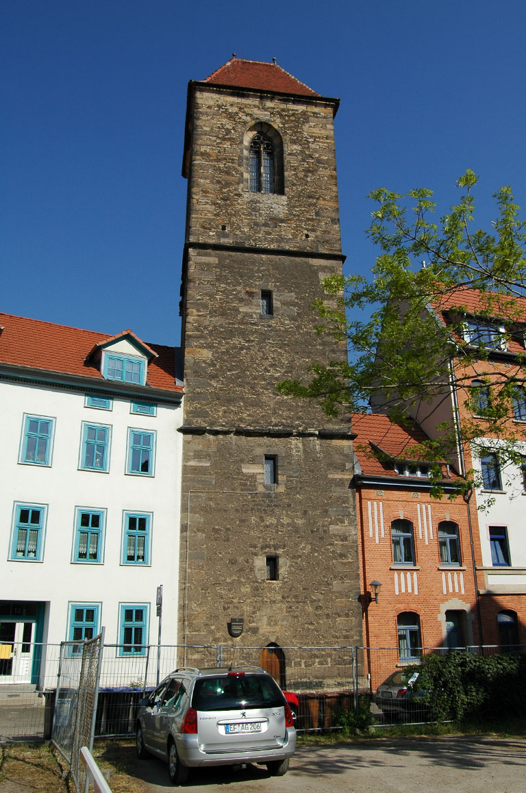 Georgsturm (errichtet 1380) in der Georgsgasse in Erfurt